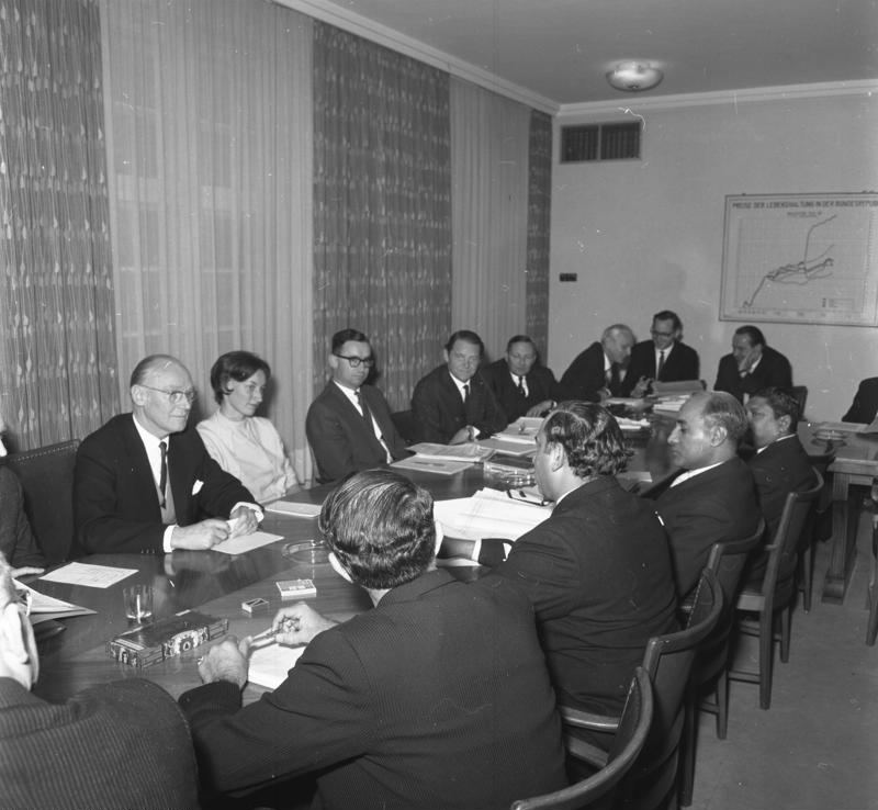 Der pakistanische Minister für Energie und Entwicklungsplanung Bhutto bei Staatssekretär Westrick